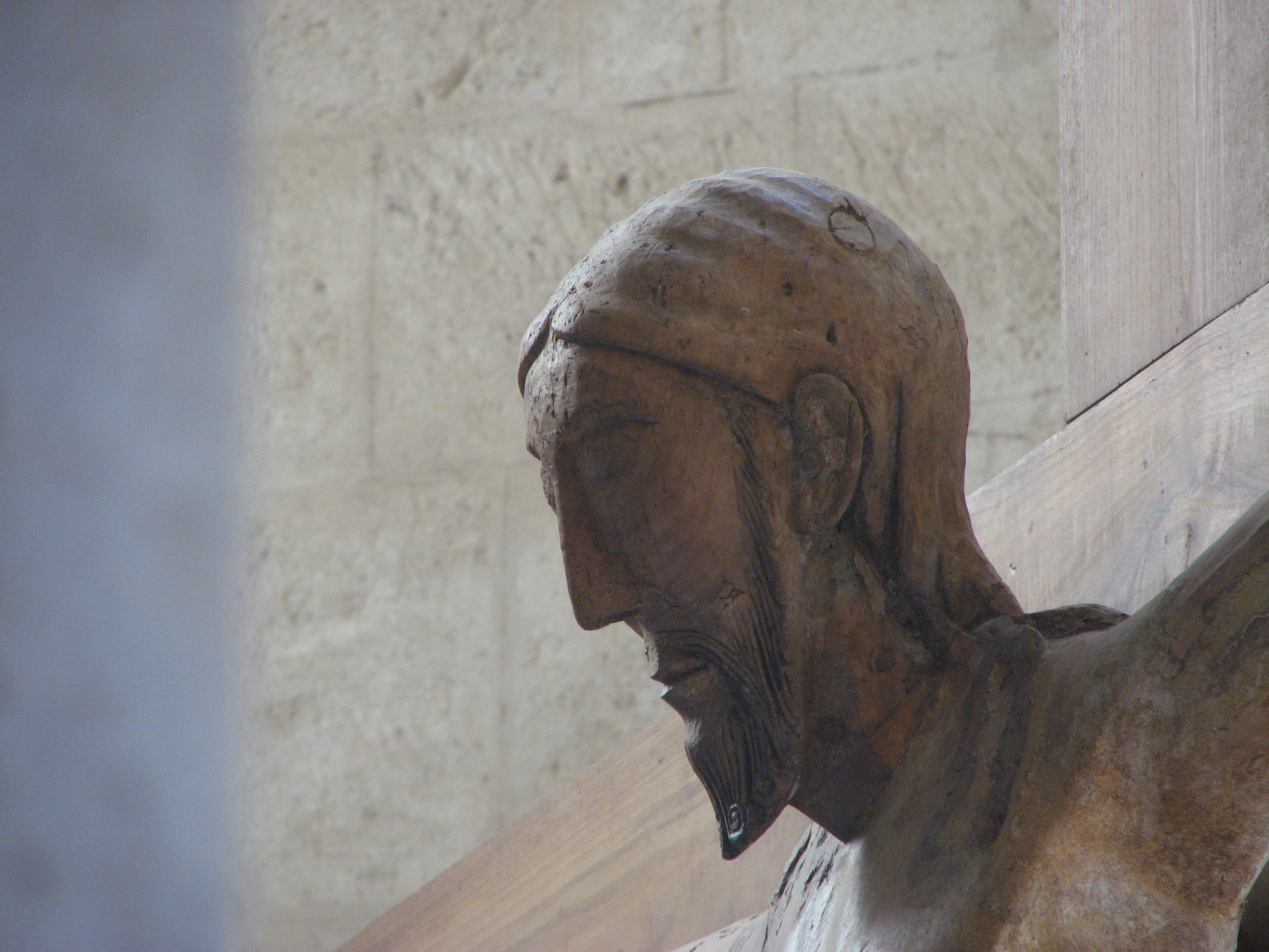 L'Abbazia di Sant'Antimo (Montalcino, Toscana, Italy) - Primo piano del crocifisso dell'altare maggiore